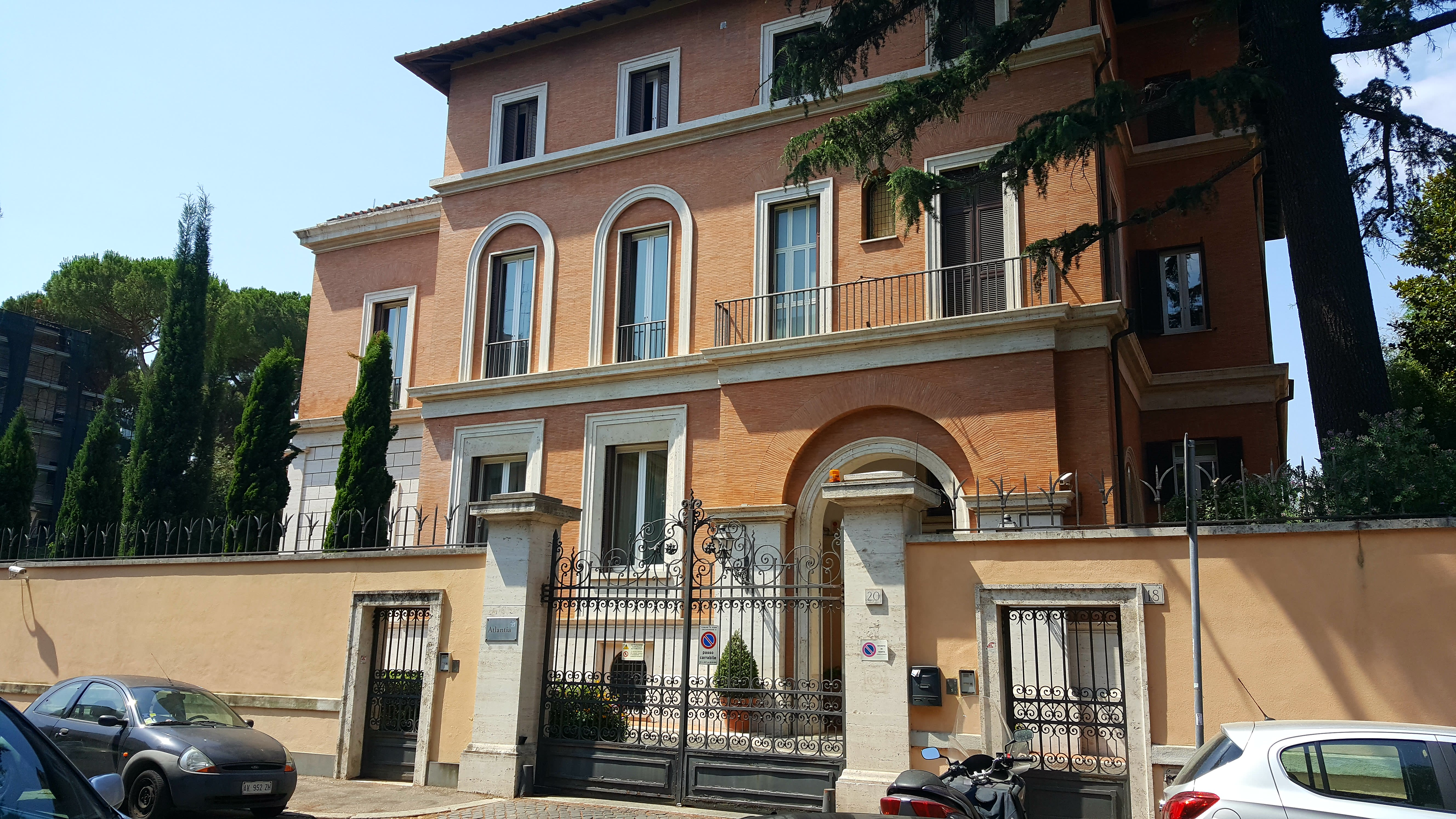 Sede di Atlantia SPA a Roma, via Nibby 20